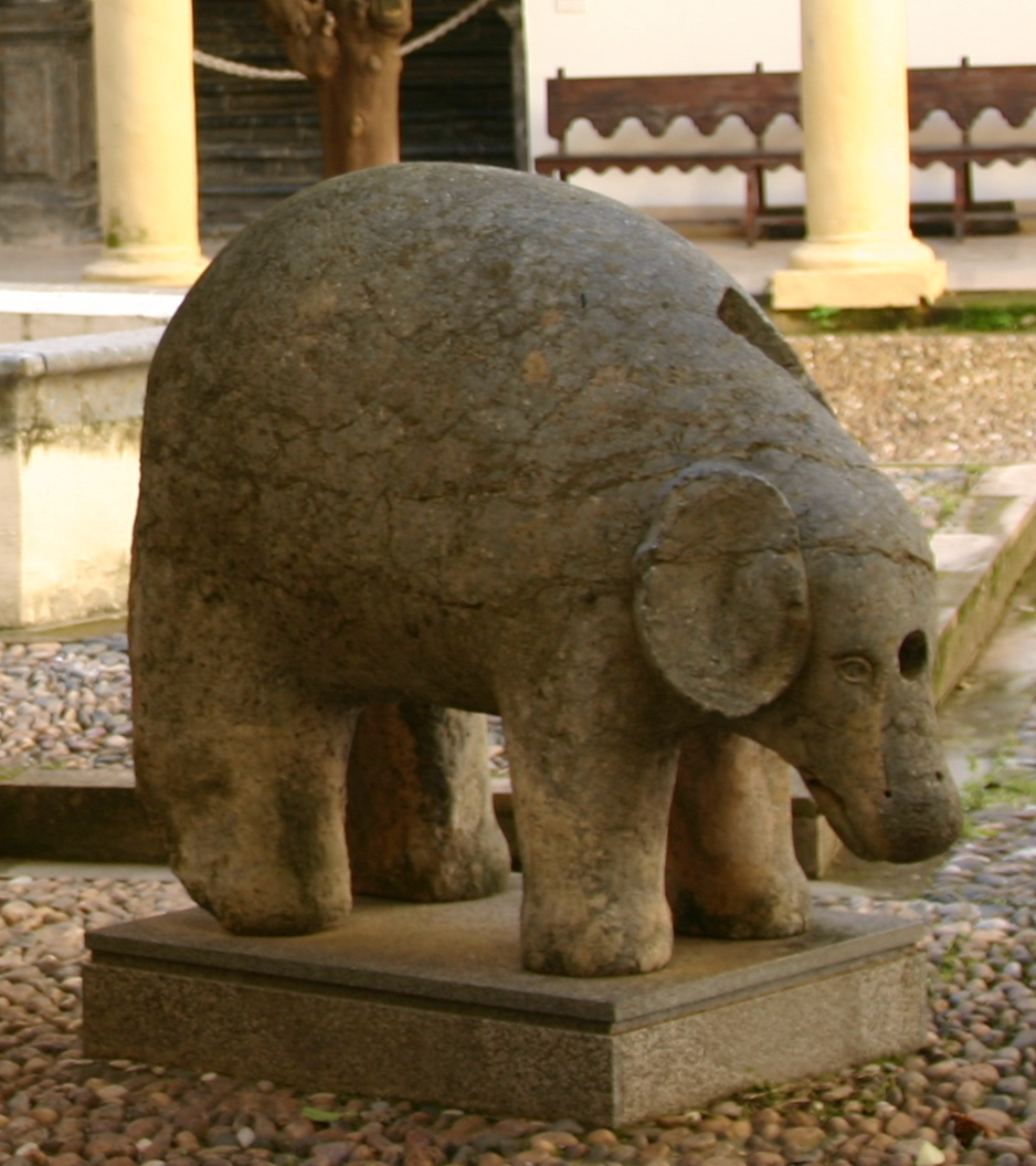 Patio de los Naranjos